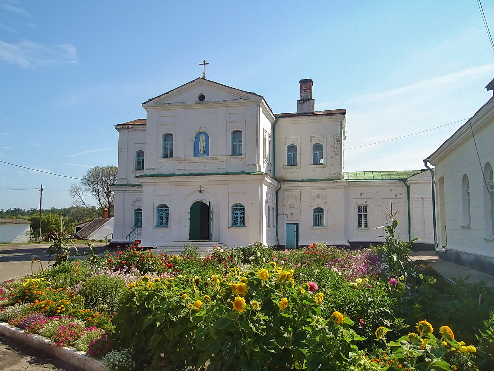 Миколаївський собор (мур.), Новомосковськ